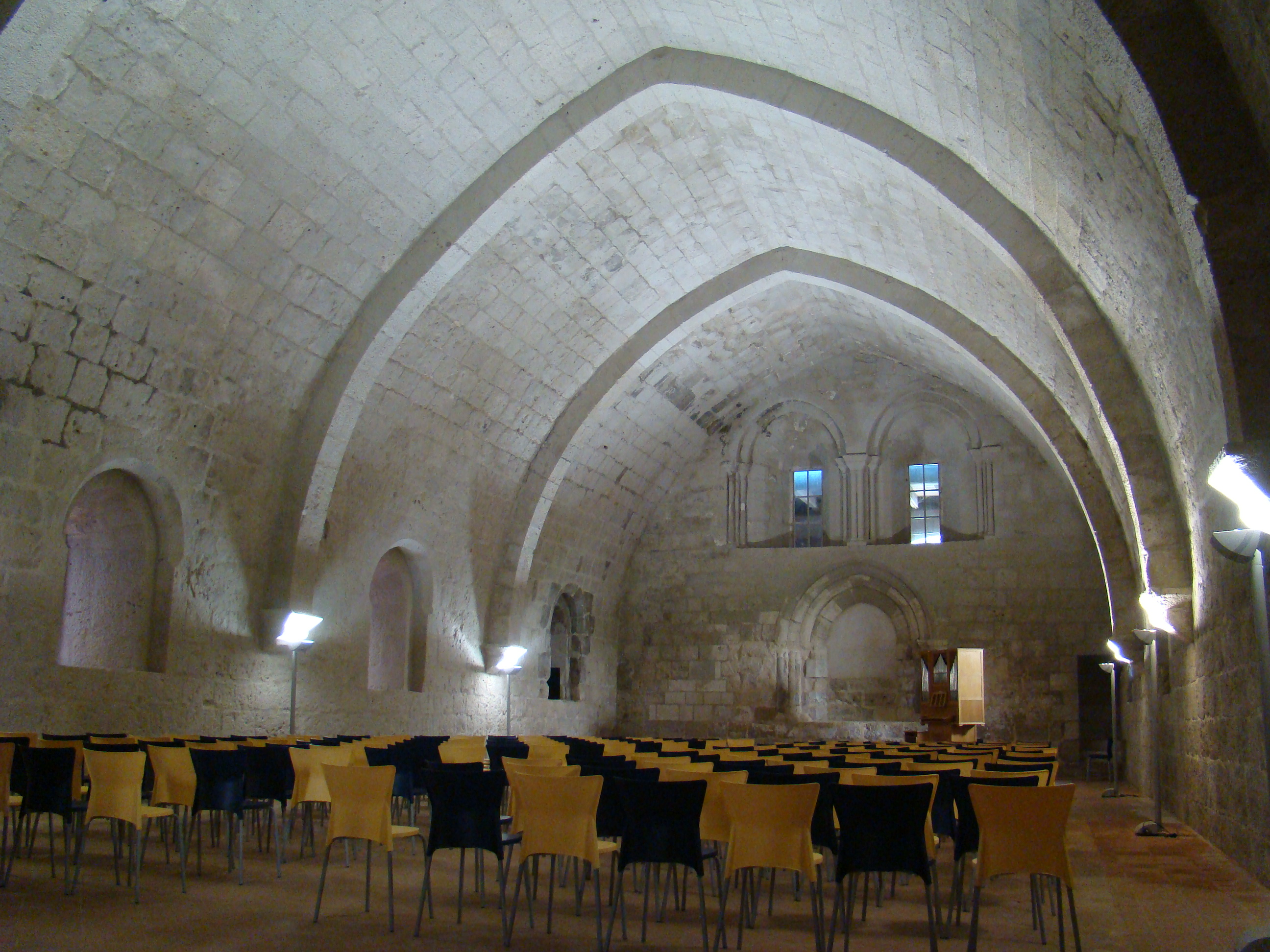 Valbuena de Duero, Valladolid, España. Claustro del monasterio de Santa María de Valbuena. Antiguo refectorio destinado a conciertos.